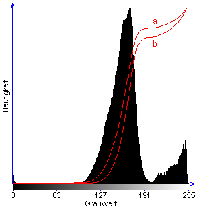 Histogramm des Bildes 113766main 04272005 tinyCrators.jpg mit Transformationskennlinen für (a) Histogrammäqualisation und (b) Histogrammhyperbolisation (α = -1/3) Quelle: selbst erstellt